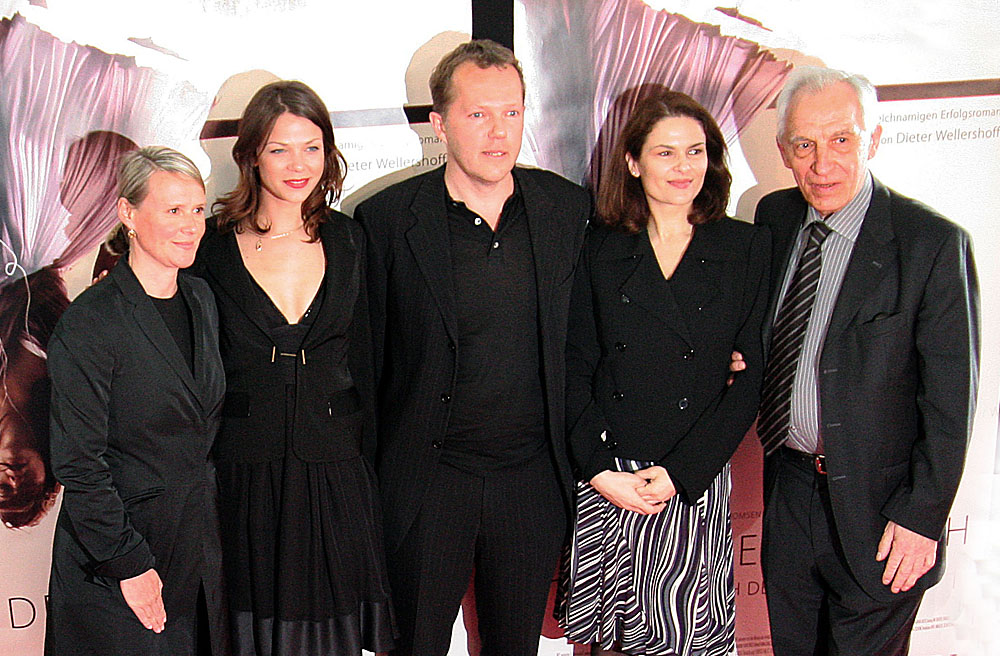 Bei der Uraufführung der Verfilmung des Romans "Der Liebeswunsch" von Dieter Wellershoff (rechts im Bild) zusammen u.a. mit den Schauspielerinnen Jessica Schwarz und Barbara Auer